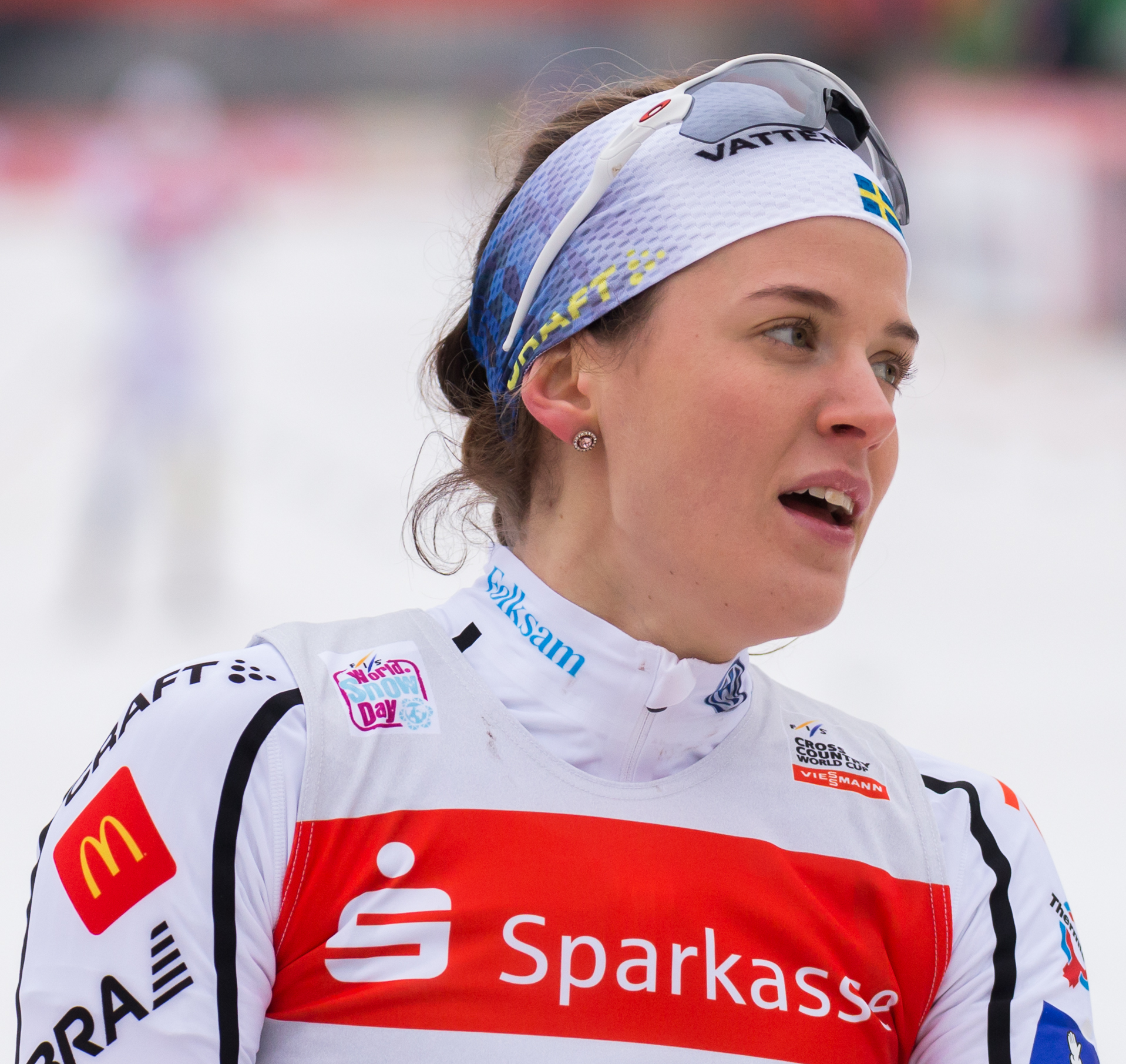 Anna Dyvik (SWE, Schweden)